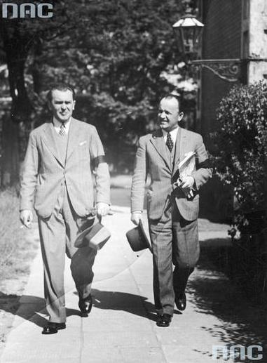 r Wiktor Kaliciński (z prawej) w towarzystwie doc. dr. Józefa Laskowskiego po wyjściu z pracowni Anatomo-Patologicznej Centrum Wyszkolenia Sanitarnego.